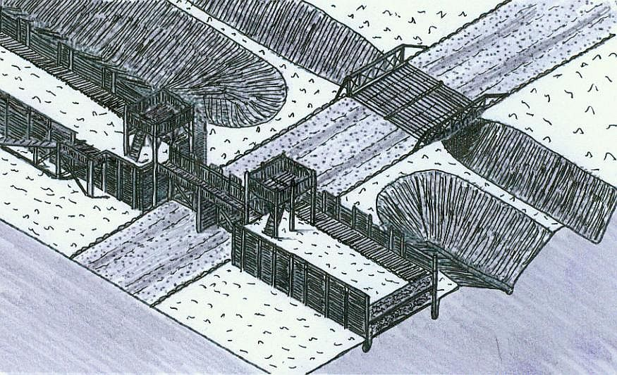 Rekonstruktionsversuch des Haupttores des Kastell Künzing (HEK II)